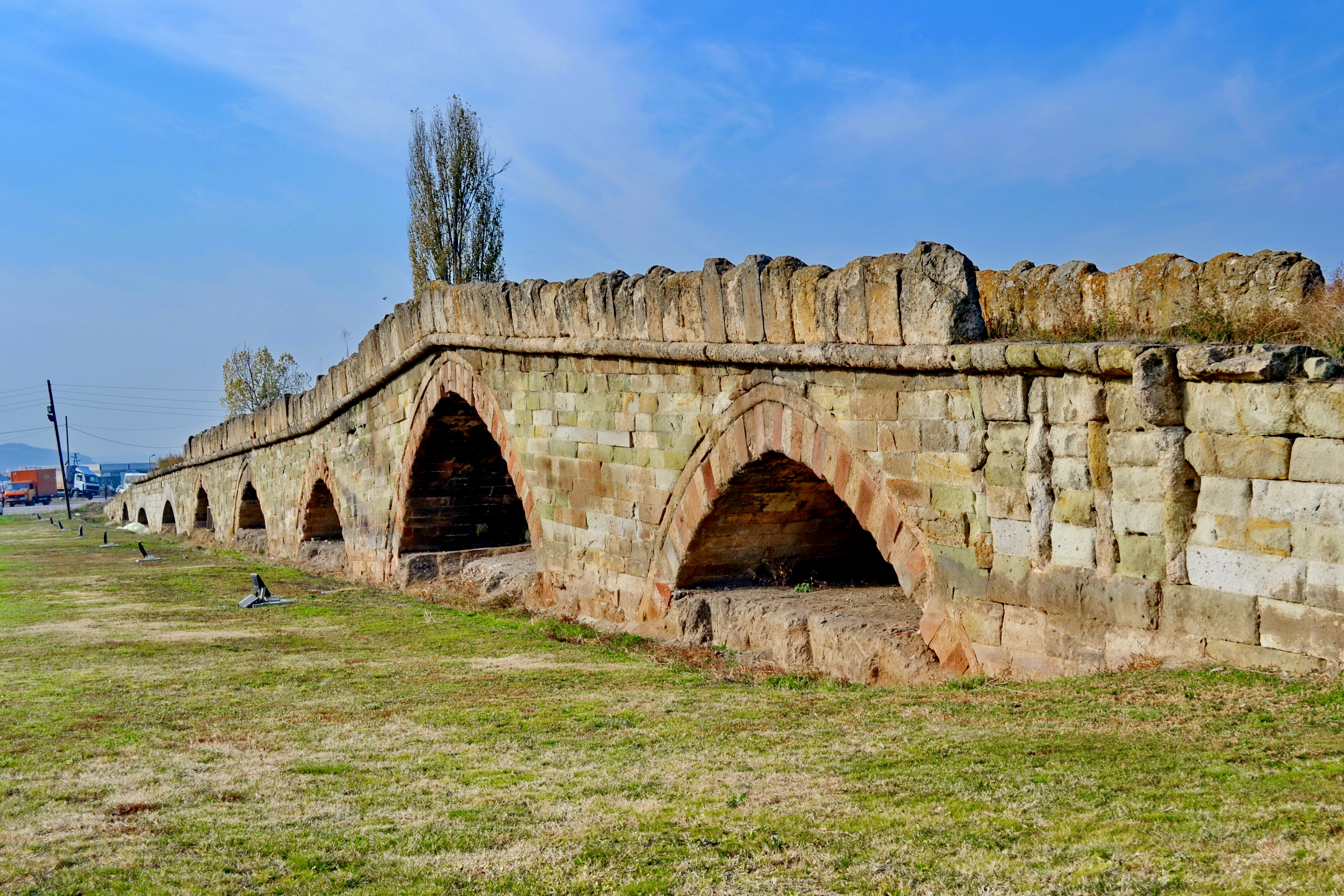 Ura e Vjetër e Gurit në Vushtrri